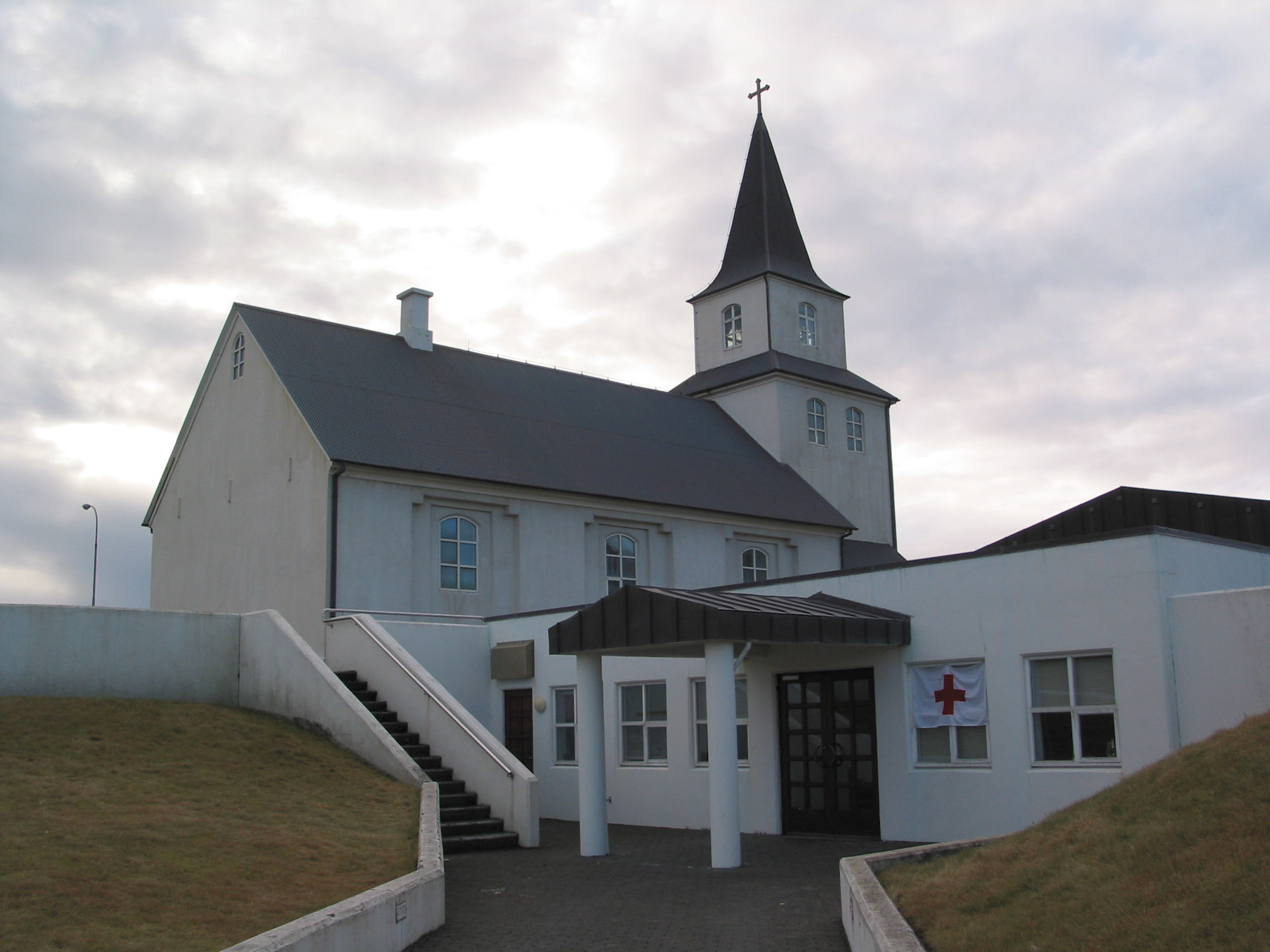 Lýsing Landakirkja, Vestmannaeyjum. Notuð sem söfnunarsvæði aðstandenda í flugslysaæfingu Flugmálastjórnar nóv. 2003.